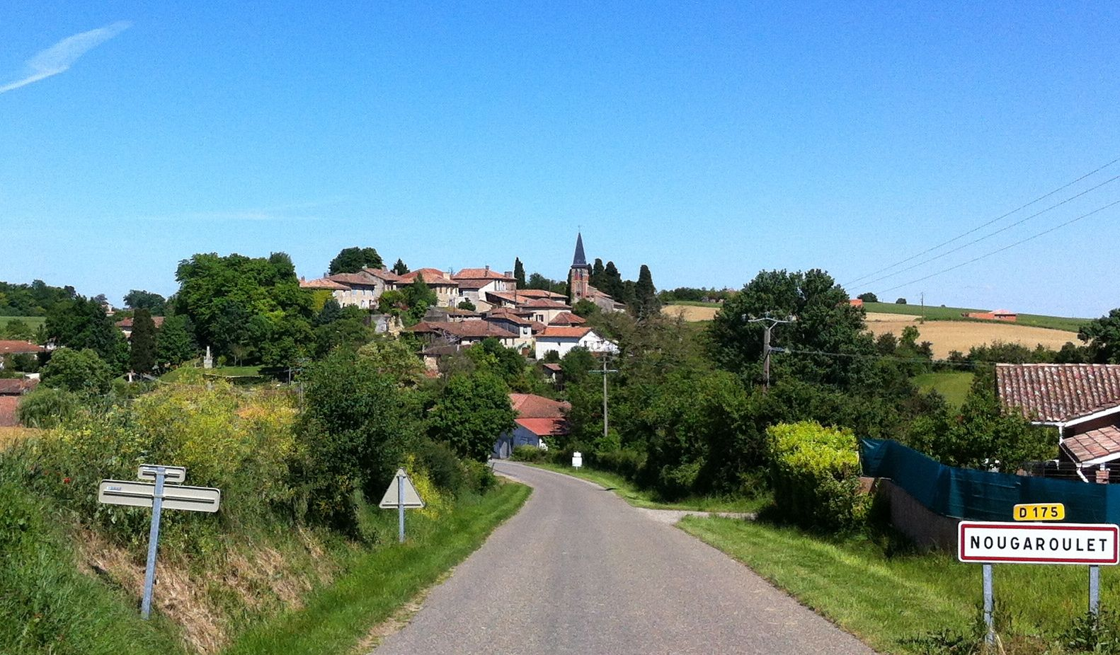 Vue sur le village de Nougaroulet, Gers